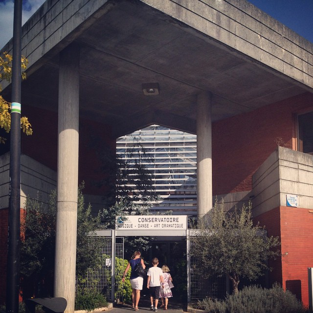 Conservatoire à rayonnement départemental d'Evry